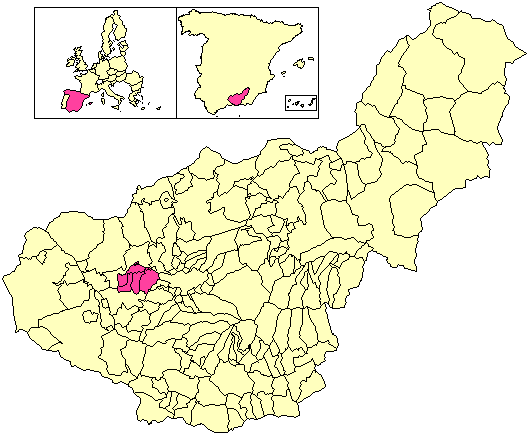 Situación de la Mancomunidad de la Vega Baja de Granada respecto a la provincia de Granada, en España, antes de 2017.